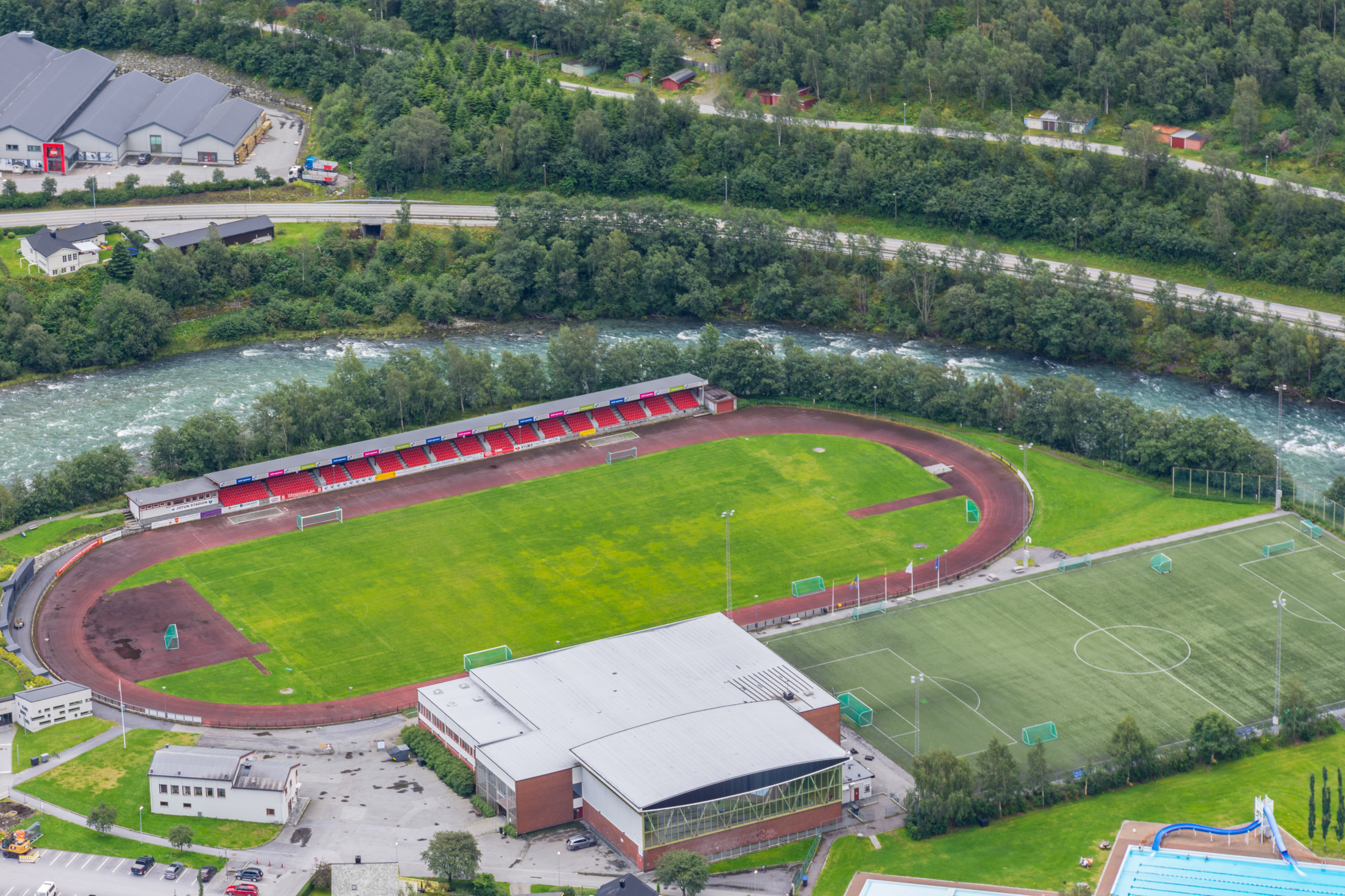 Jotun Stadion sett fra Ramneberg.